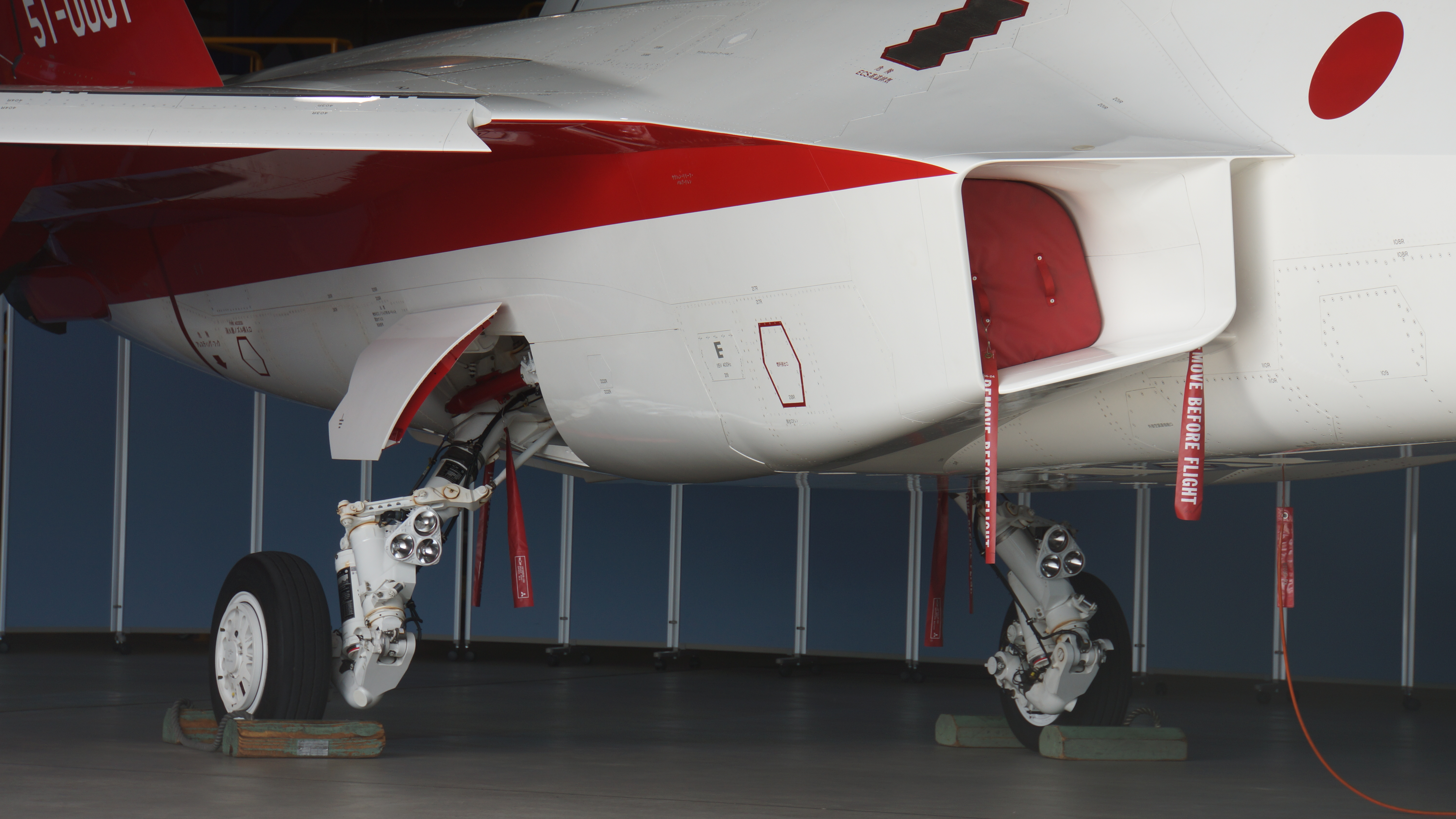 先進技術実証機 X-2 空気取り入れ口および主脚。2016年10月30日 航空自衛隊岐阜基地にて。